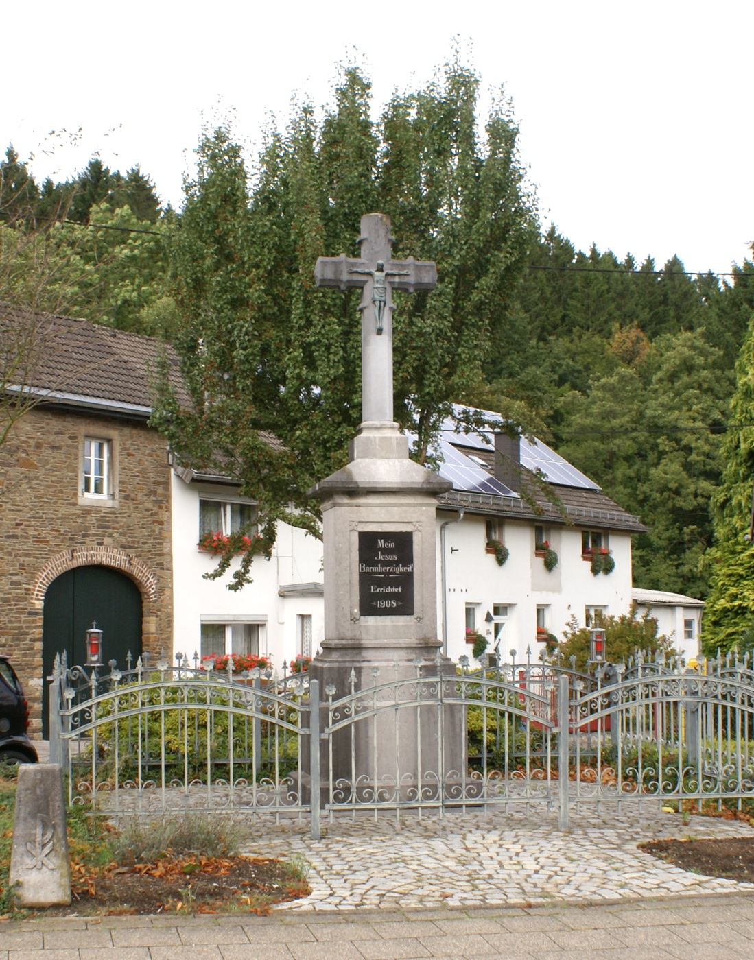 Roetgen-Mulartshütte Zweifaller WegkreuzThis is a photograph of an architectural monument., no. 42